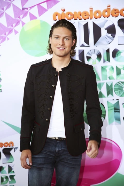 Actor